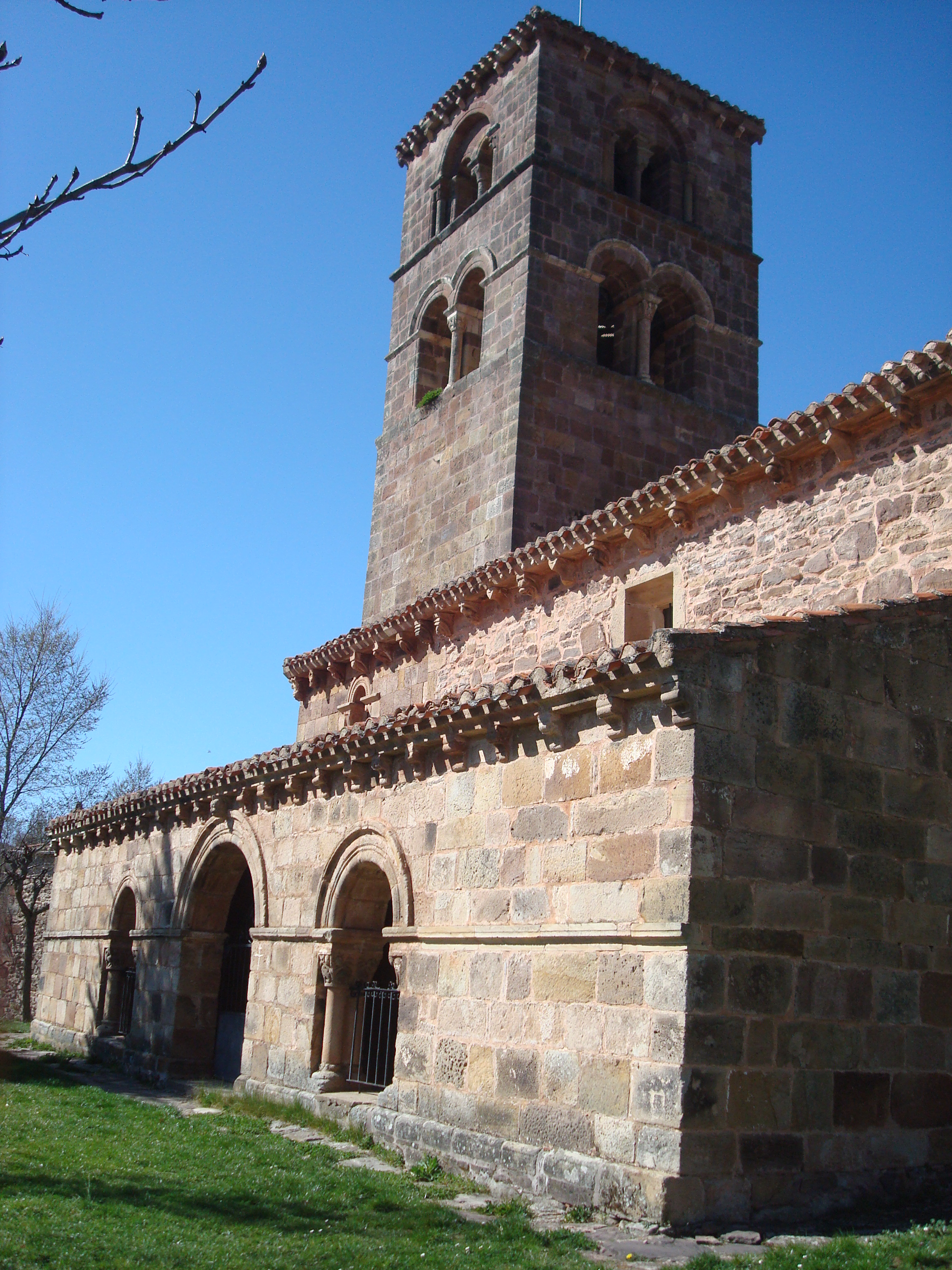 Vizcainos de la Sierra - 002